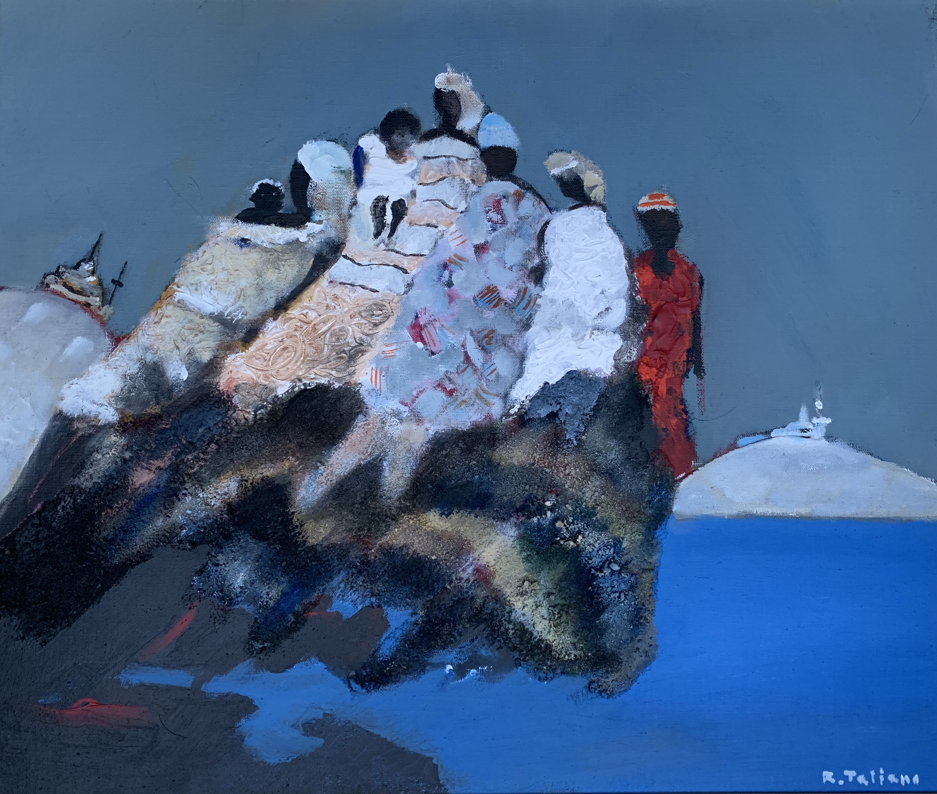 Berberi